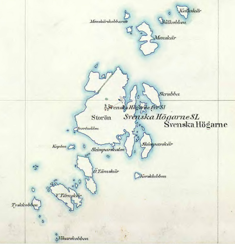 Häradsekonomisk karta över Stockholms skärgård från 1901.